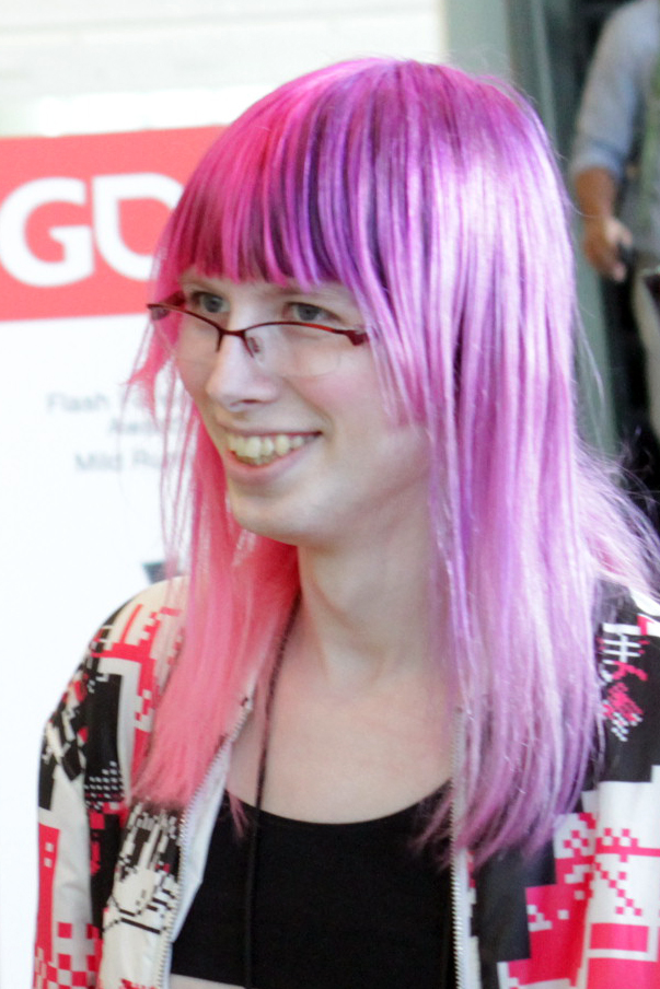 General